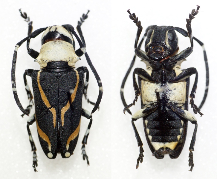 Pascoe,1869 Sex: ? Data: 10-2013 - Ebogo - Cameroon